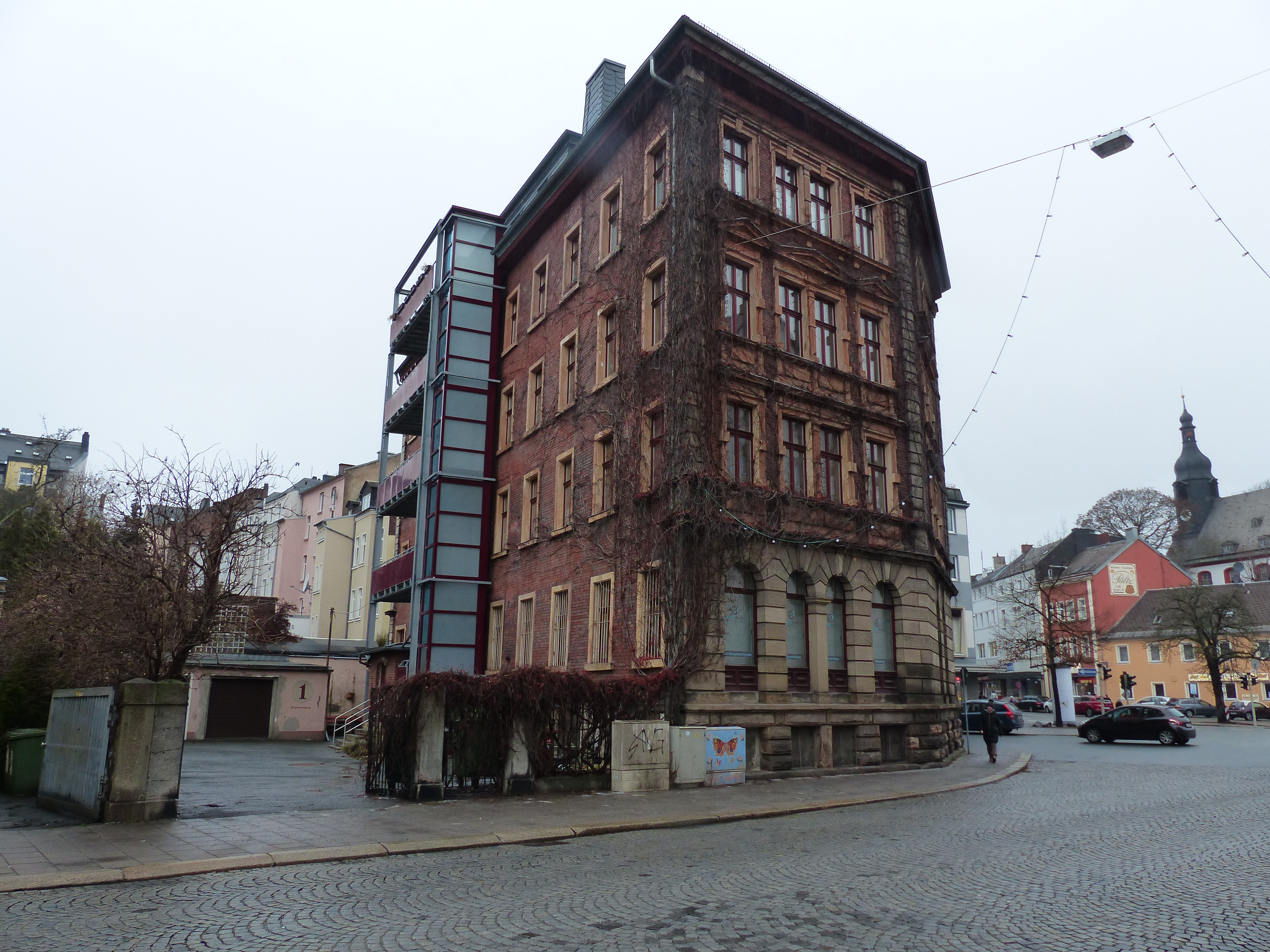 Hansa Haus in Hof, Sophienberg 1